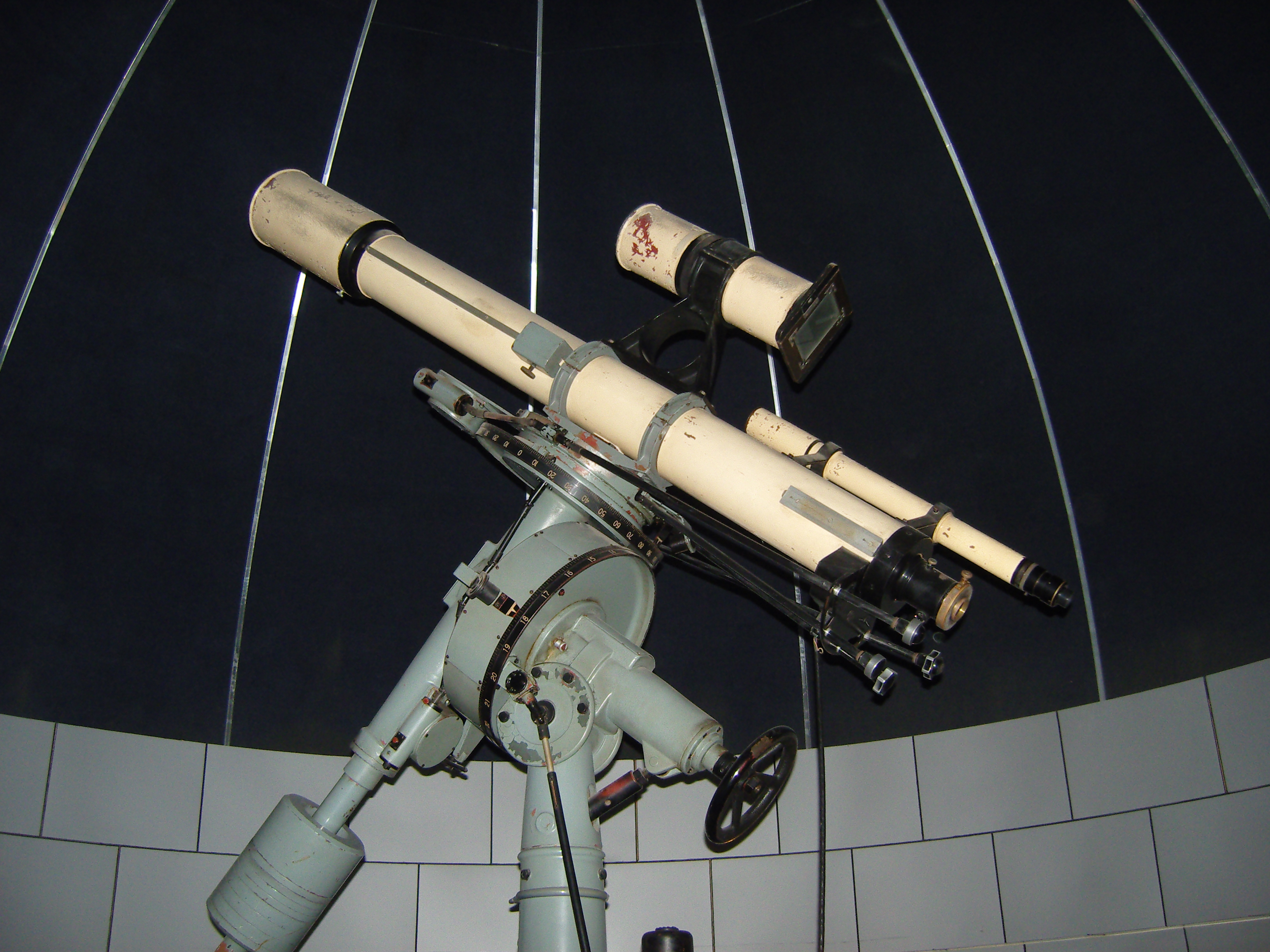 北京天文馆的蔡司130折射式望远镜